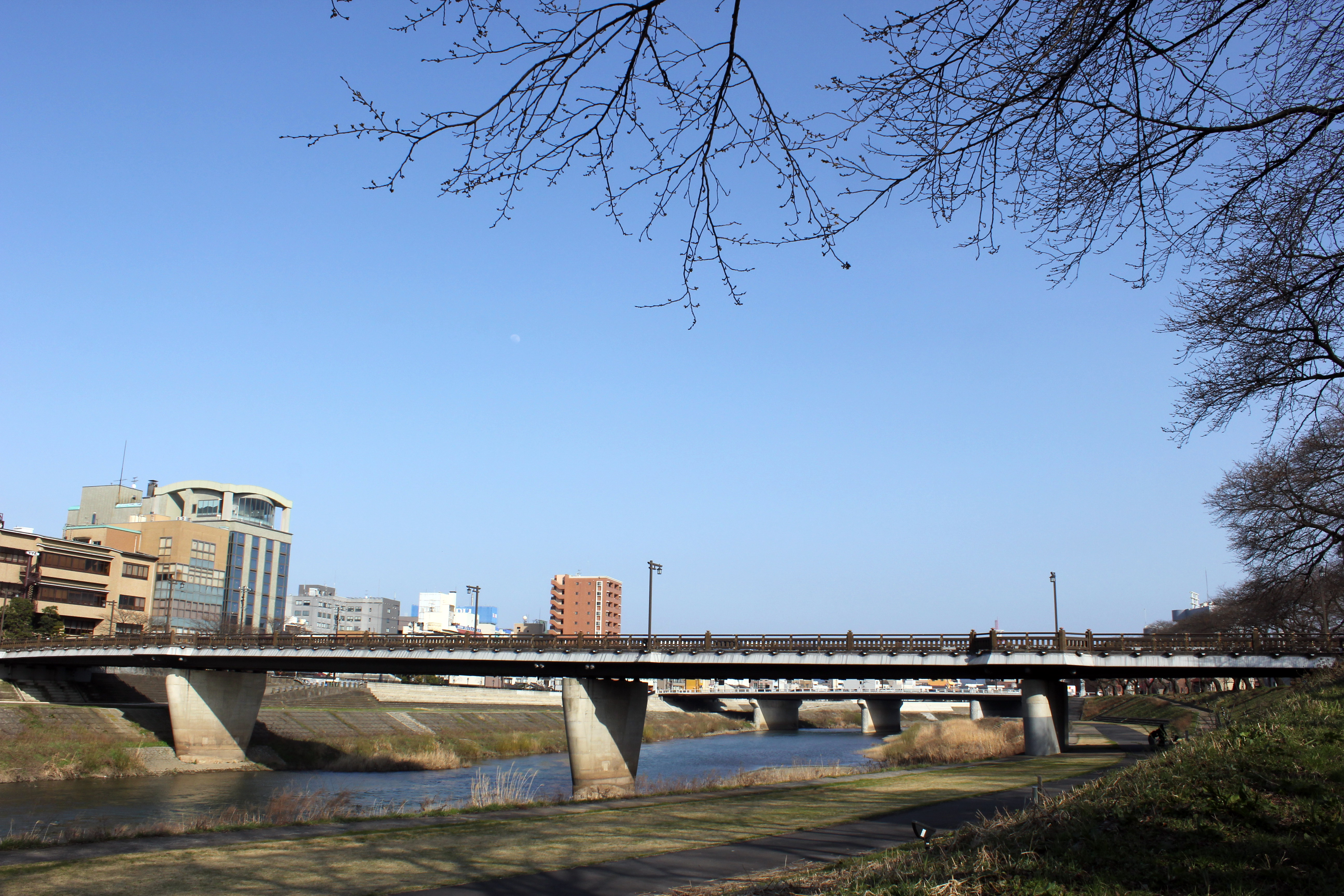 桜橋（福井県）